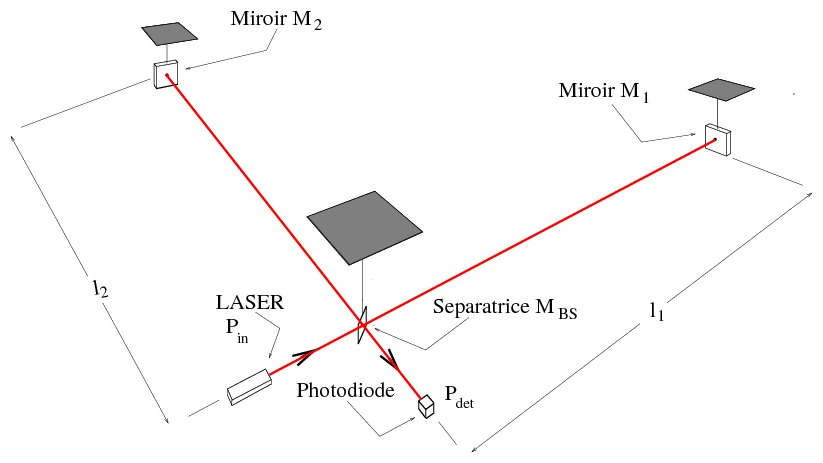 Schéma d'un interféromètre de Michelson avec miroirs suspendus. Configuration de base pour les détecteurs interférométriques d'ondes gravitationnelles géants comme Virgo et LIGO